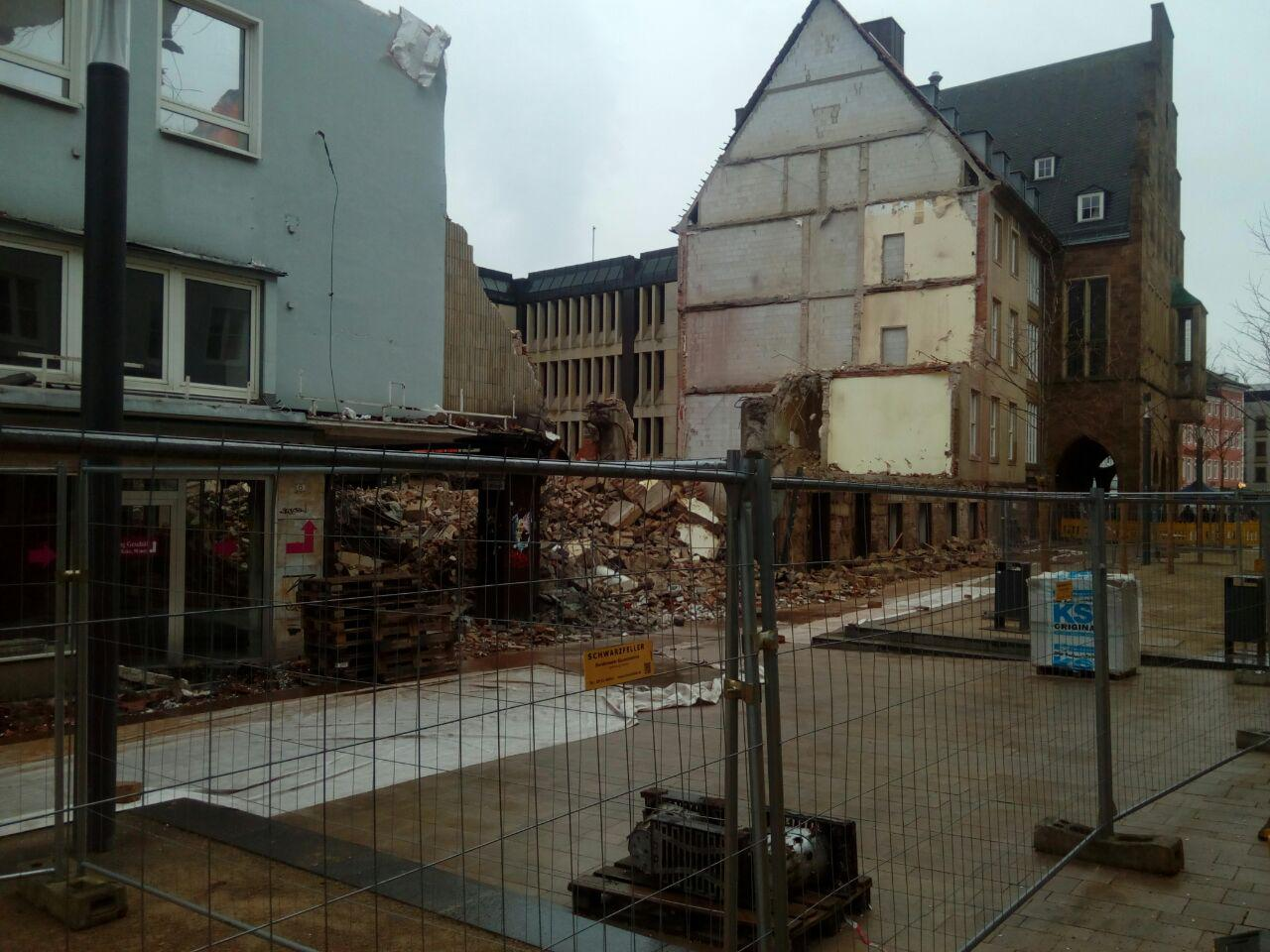 Bauarbeiten am Scharn in Minden. Das Haus an der Scharnpassage ist weggerissen. Der ehemalige Ratskeller steht noch